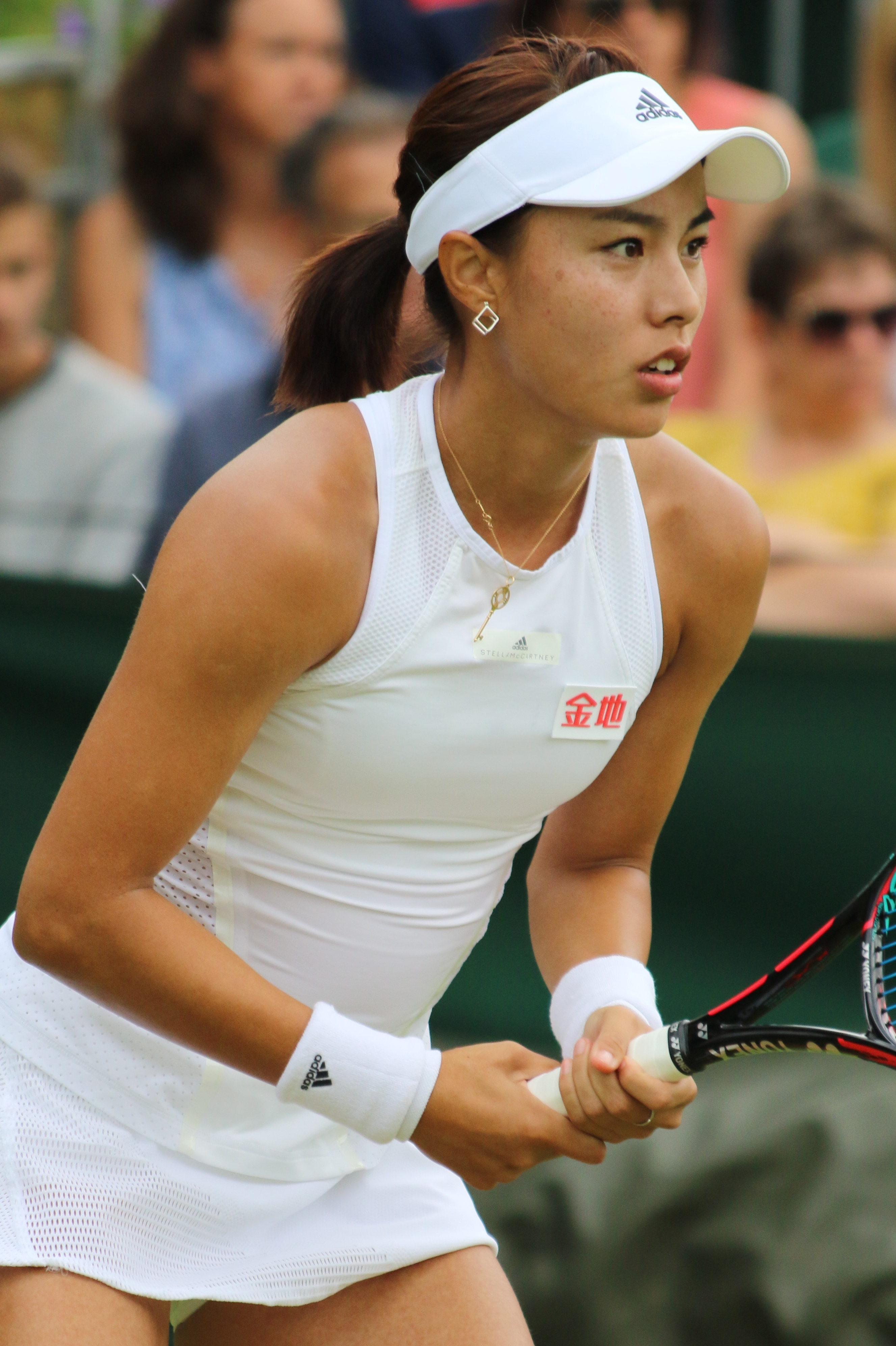 Wang Q. WM17 (14)